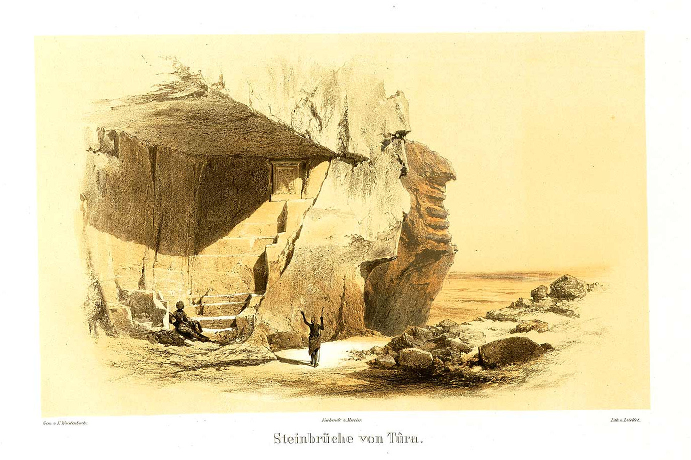 Tourah, Mokattam, Egypt. Denkmaeler aus Aegypten und Aethiopien nach den Zeichnungen der von Seiner Majestät dem Koenige von Preussen, Friedrich Wilhelm IV., nach diesen Ländern gesendeten, und in den Jahren 1842–1845 ausgeführten wissenschaftlichen Expedition auf Befehl Seiner Majestät מצבות זיכרון ממצרים ואתיופיה על פי הציורים שצוירו בהוראת הוד רוממותו מלך פרוסיה פרידריך הרביעי, בידי משלחות מדעיות בשנים 1842-1845 ששוגרו בפקודת הוד רוממותו